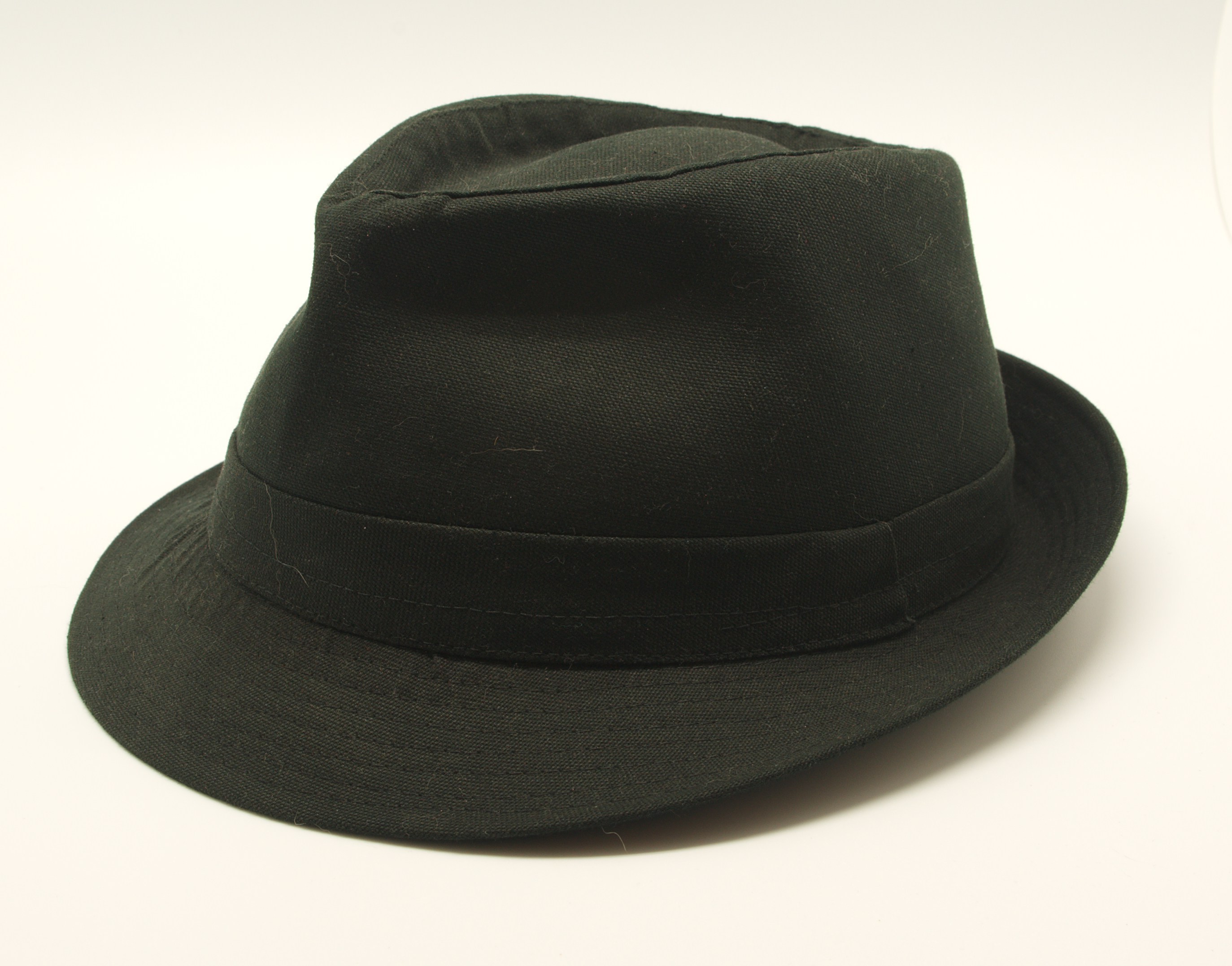 Chapeau noir